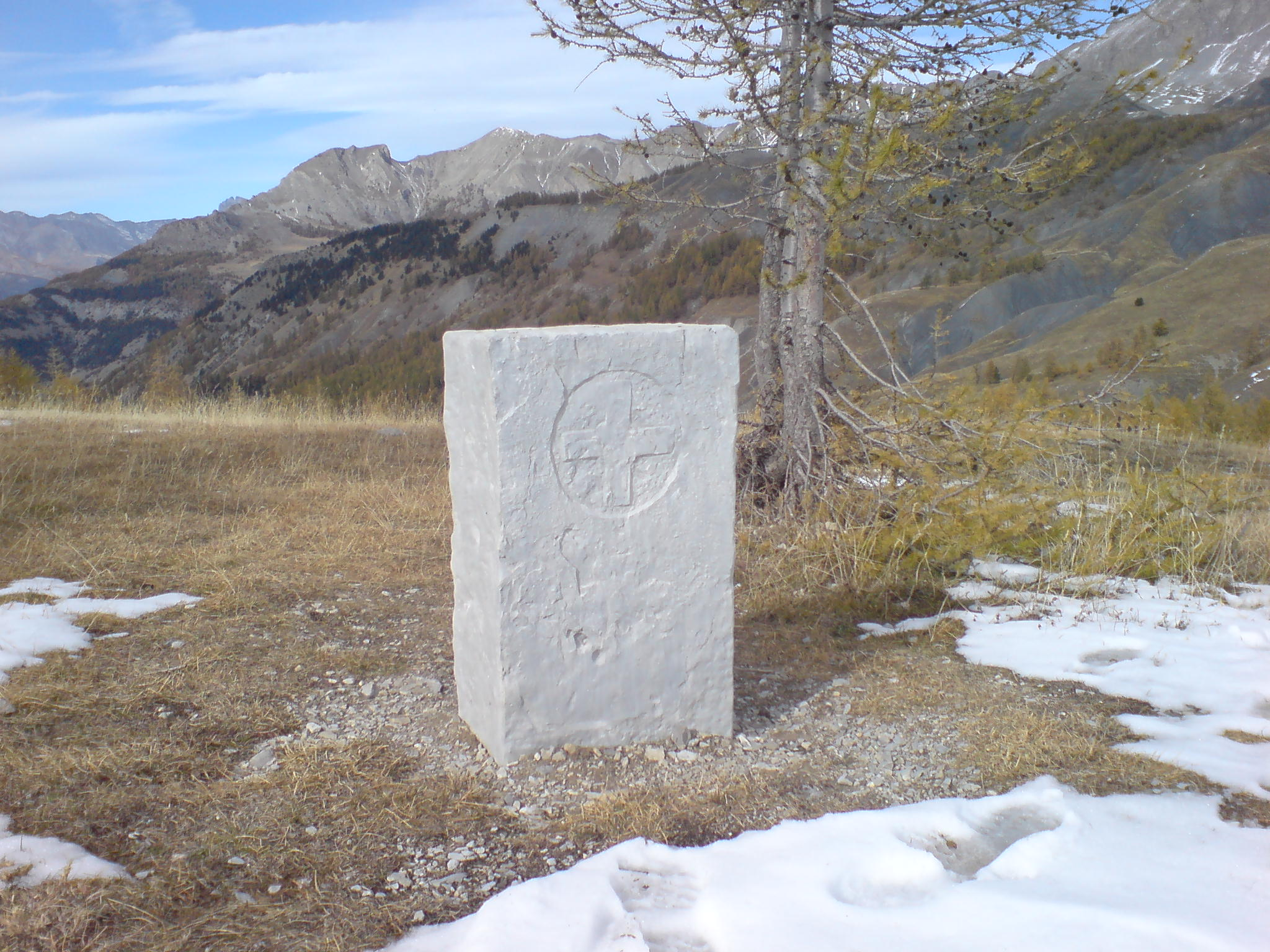 Borne frontière, posée au col des Champs en 1823, quand il marquait la limite entre le royaume de France et le royaume de Piémont-Sardaigne. Elle porte l'inscription 1823, la fleur de lys et la croix de Savoie (face visible).